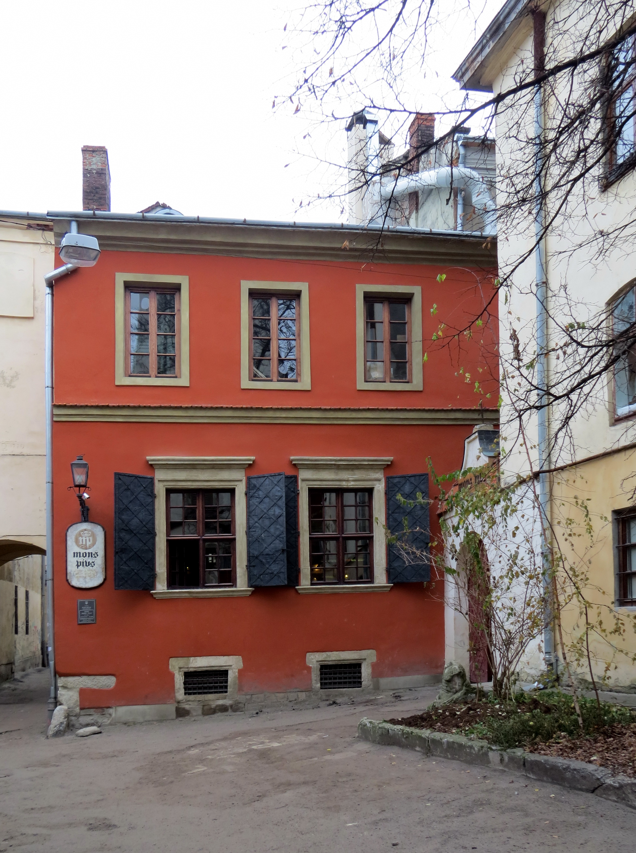 Житловий будинок (17-19 ст.) - вигляд з вул. Вірменська - Львів (Лесі Українки, 14) Україна